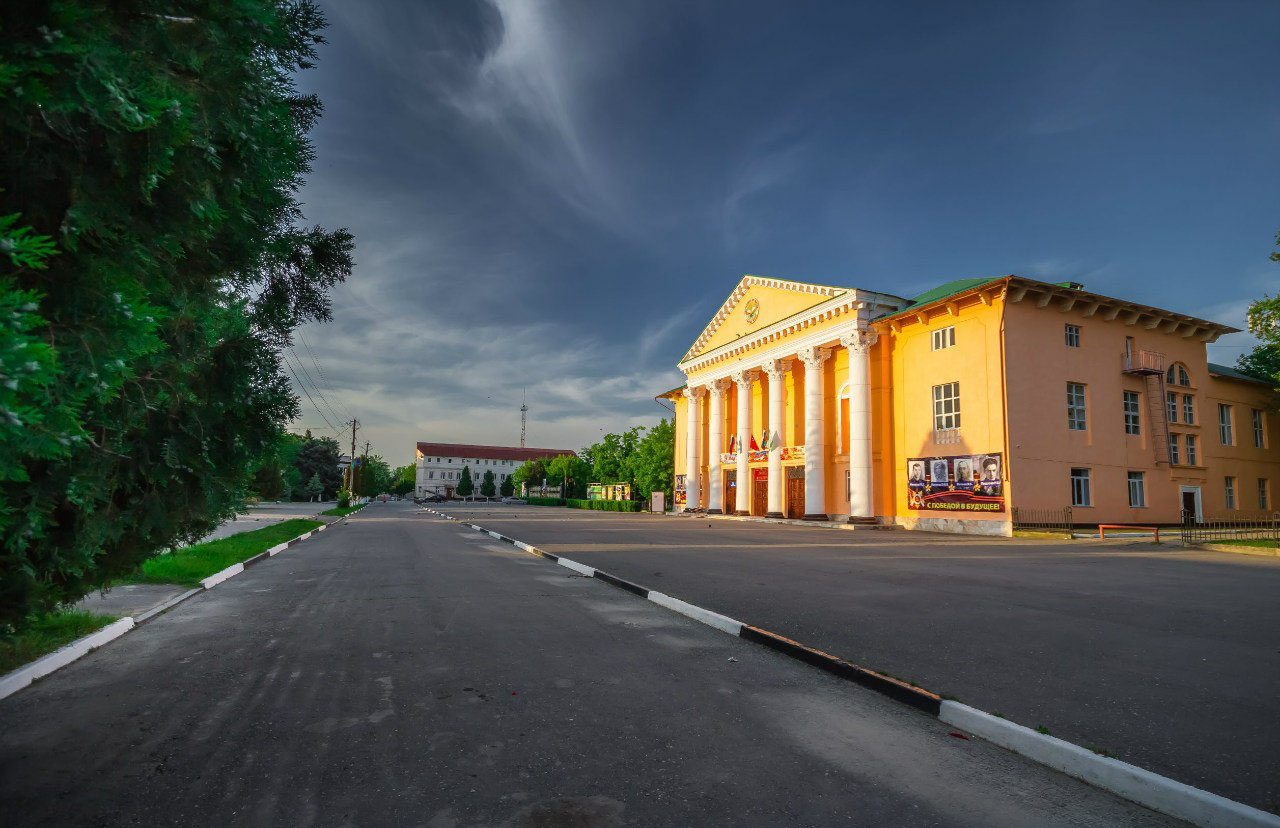 Центральная площадь и Дворец Культуры города Сунжи Республики Ингушетия